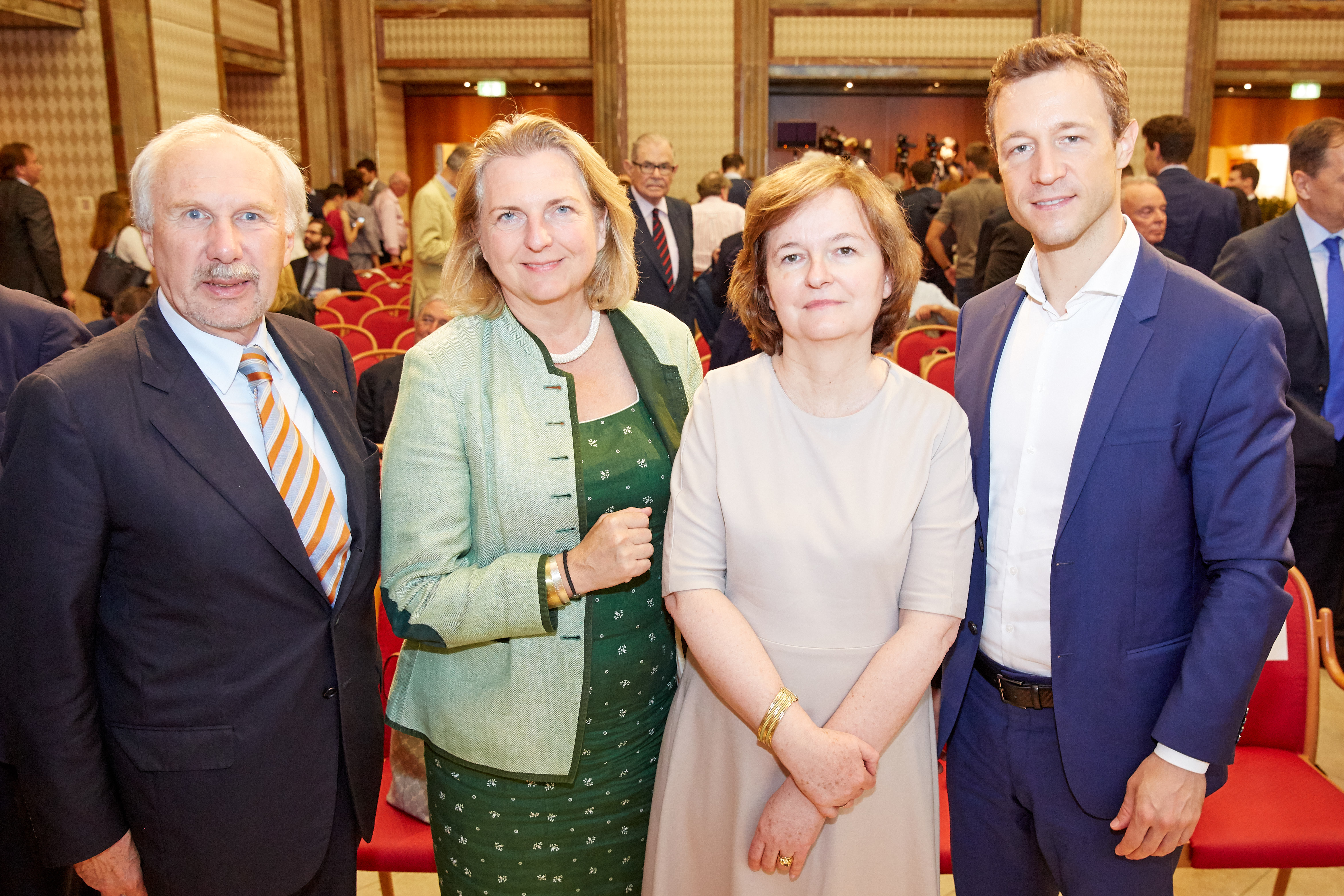 © Schneider - Wien 21.06.2018 - Das österreichische Ausseministerium (BMEIA) lud heute in der Österreichischen Nationalbank (ÖNB) zu einer hochkarätig besetzten Konferenzdiskussion mit dem Thema: `ZUKUNFT DER EUROPÄISCHEN UNION` ein. PHOTO: Ewald Nowotny (L), Gouverneur der Oesterreichischen Nationalbank, . Karin Kneissl (2vL/Parteilos), Bundesministerin für Europa, Integration und Äußeres, . Gernot Blümel (ÖVP),, Bundesminister für EU, Kunst, Kultur und Medien, . Nathalie Loiseau (2vR), die französische Ministerin für Europäische Angelegenheiten